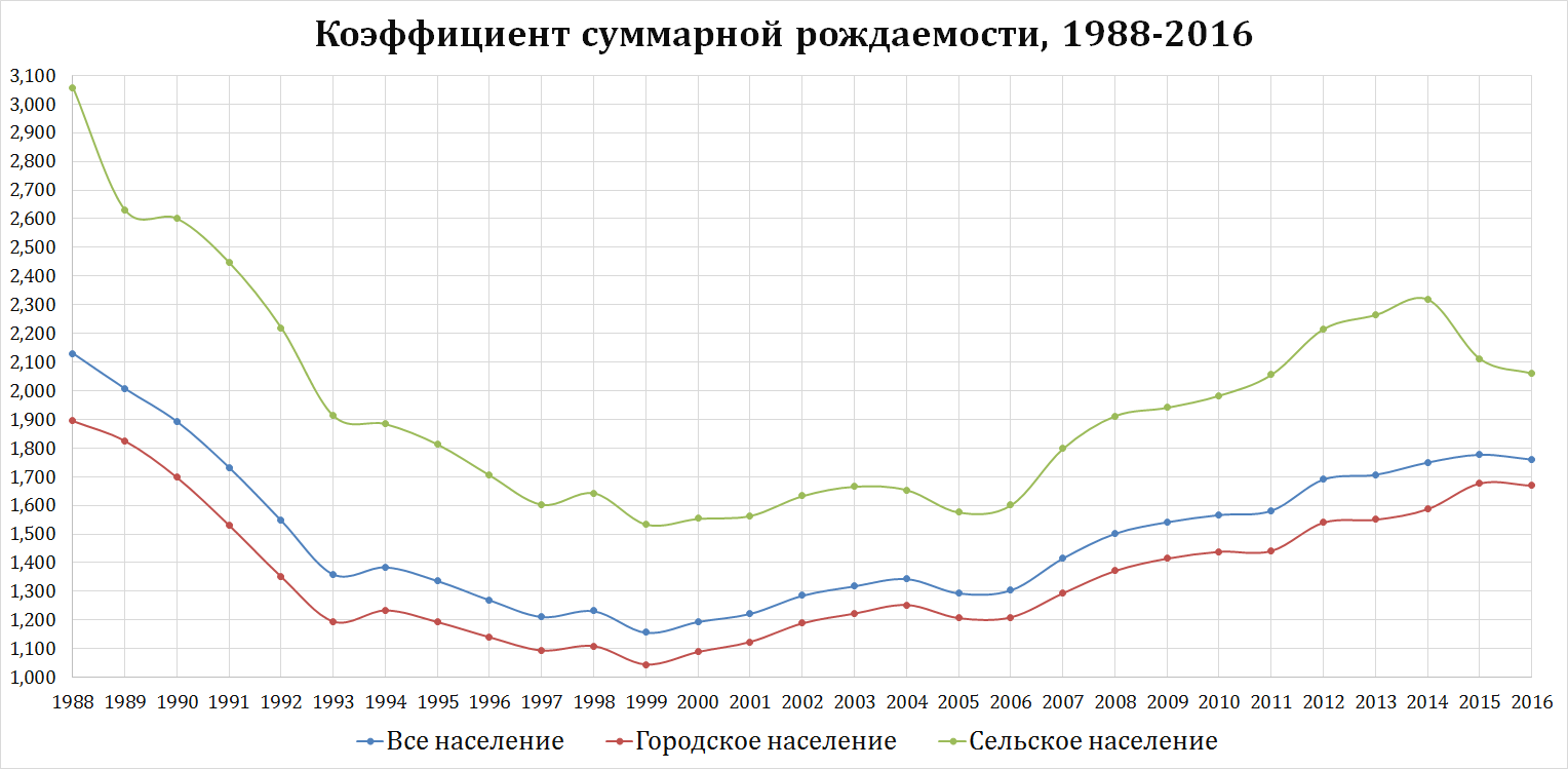 Россия. Коэффициент суммарной рождаемости, 1988—2016